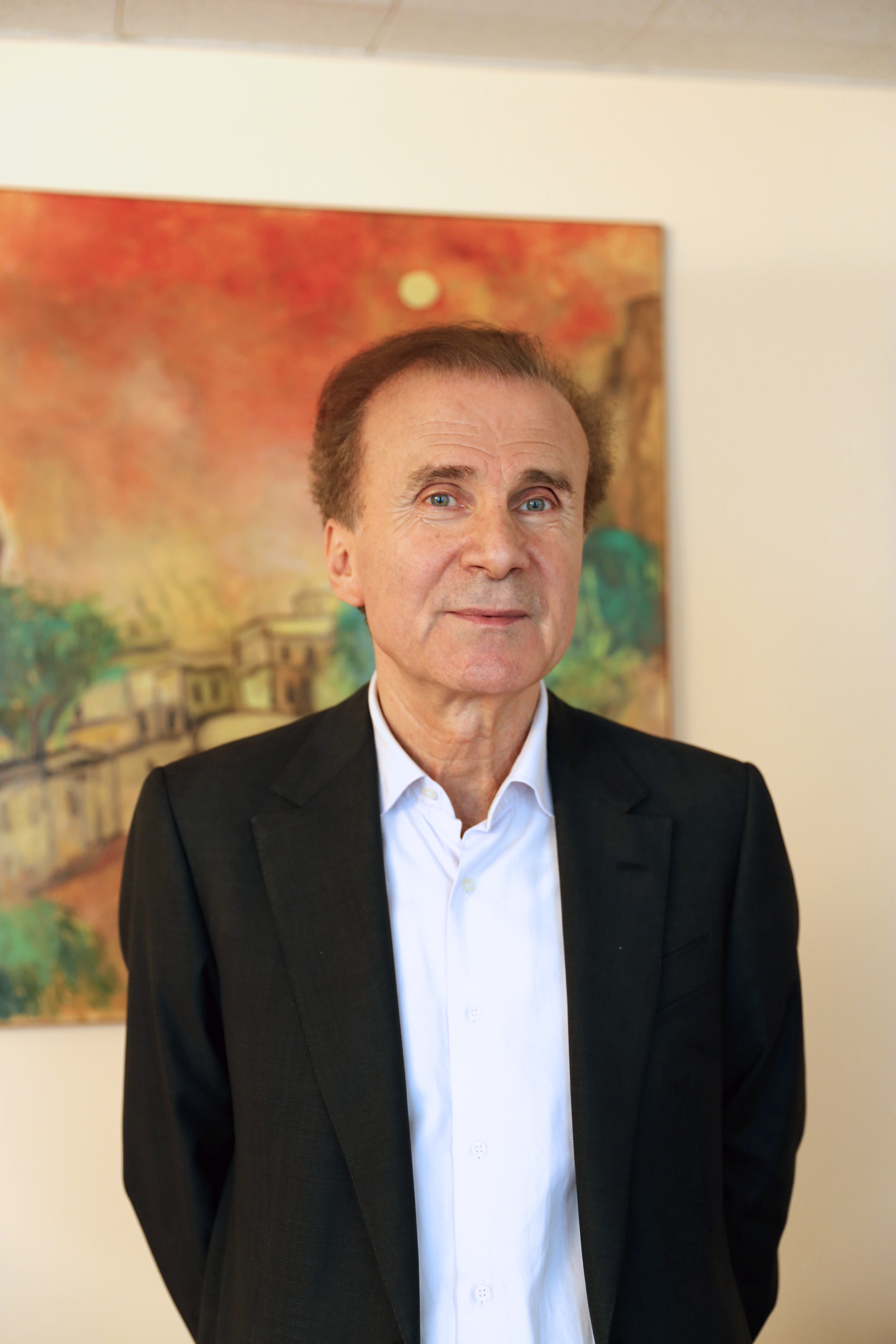 Kendal NEZAN dans son bureau